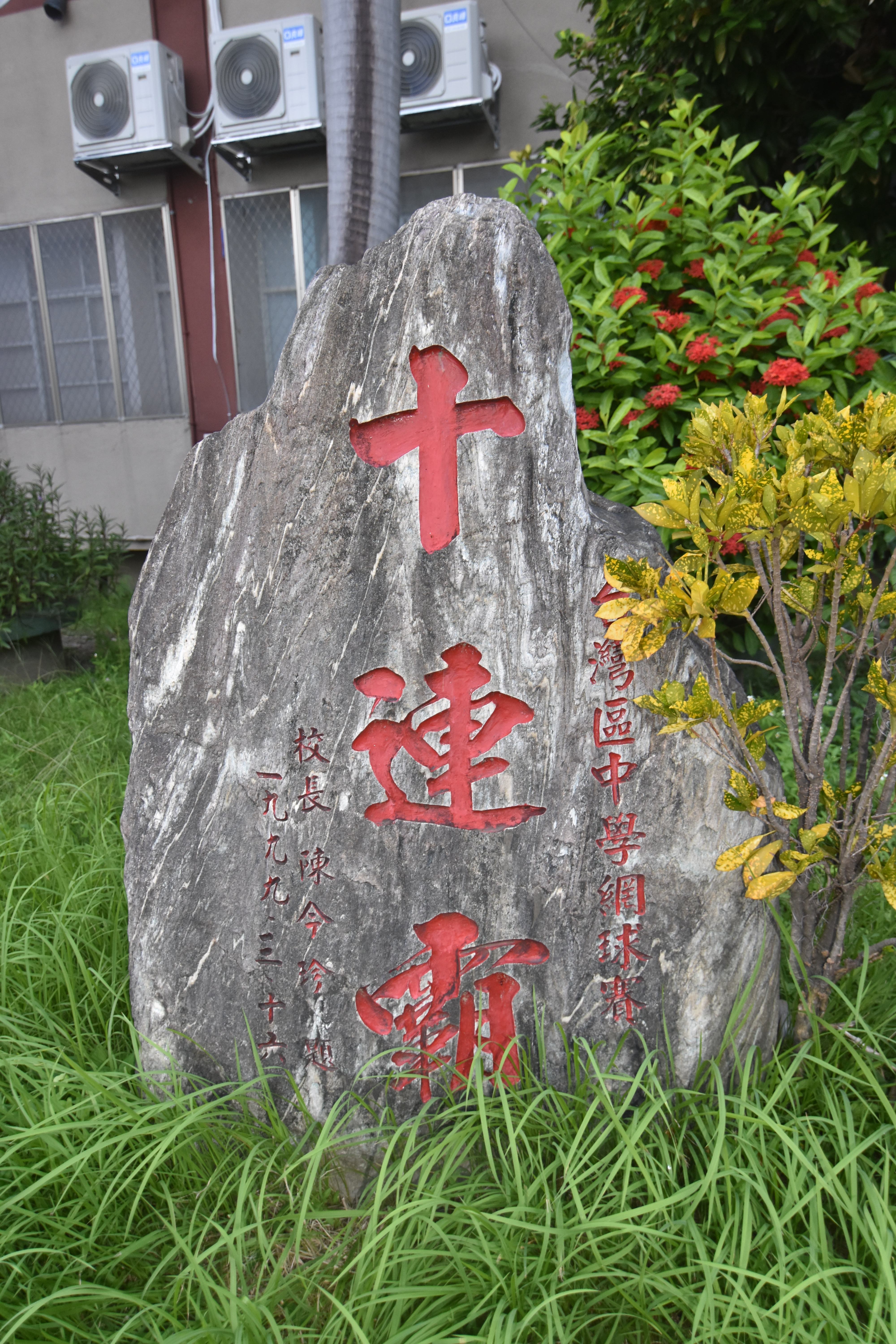 中文（台灣）: 新興國中成立於1968年，校址臺北市 中山區林森北路511號，是大家耳熟能詳，香火鼎盛的行天宮舊址，在這充滿上天庇蔭，與祝福的校地，建立起一所優質又宏偉的校園，在歷任校長與教職員的努力下，新興國中漸成一所優質的學園。網球績優紀念碑。 0544128,121.5634318, 臺北市新興國中北市中 山區林森北路511號座標25.0544128,121.5634318